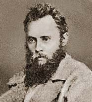 Timofej Aleksandrovič Kvjatkovskij, il fratello di Aleksandr, come si desume dalla fonte originaria dell'immagine